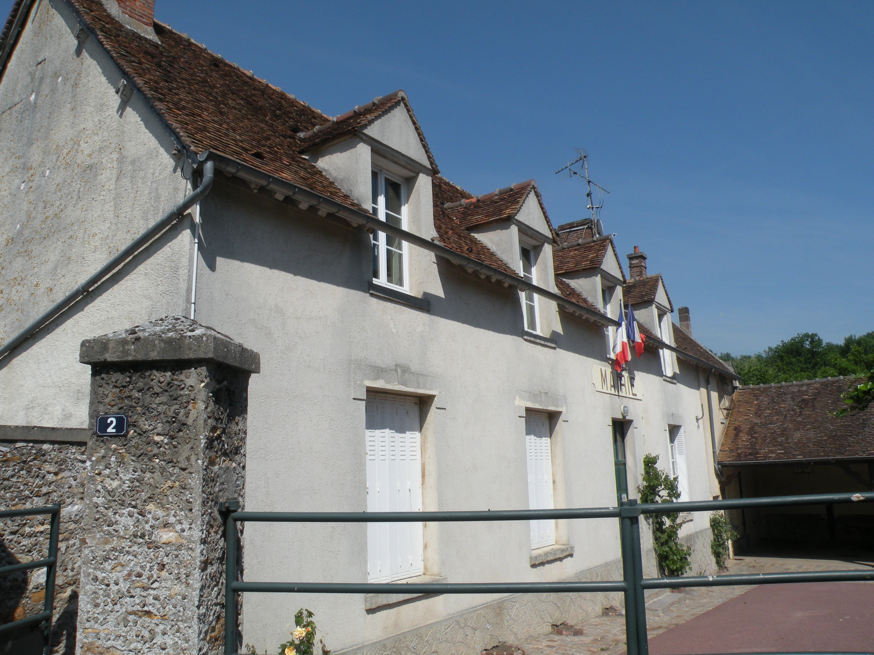 mairie de Neuilly-en-Vexin